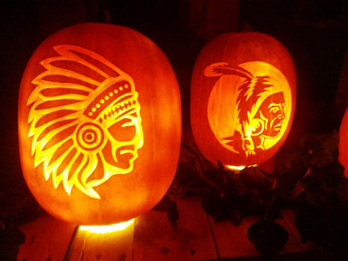 Chürbisliechter mit Indianermotiv z Ruedelfinge.